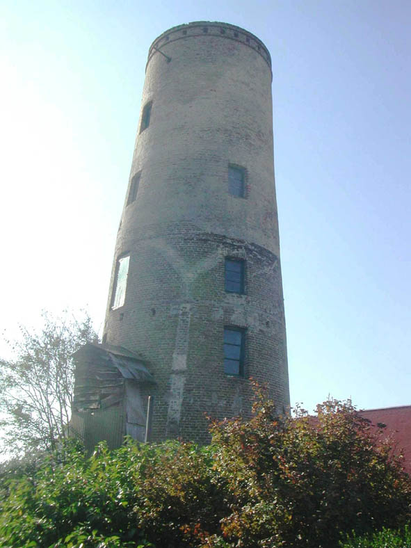 Jabbeke Dorpsstraat 88-90